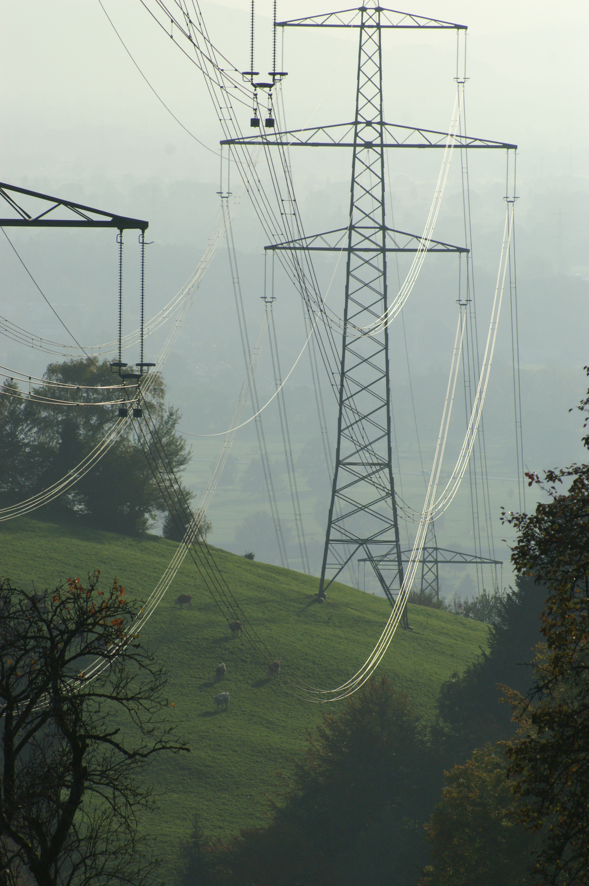 Hochspannungsleitung von Bildstein ins Rheintal (Kühe unter Strom)